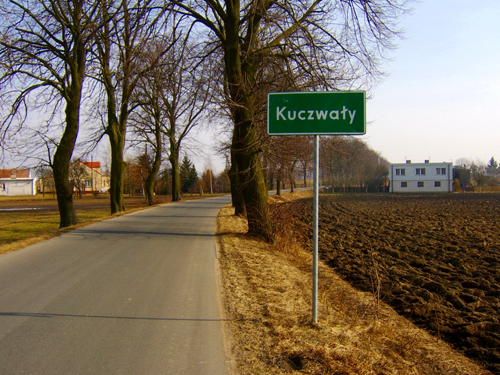 Wieś Kuczwały - wjazd od Grzywny